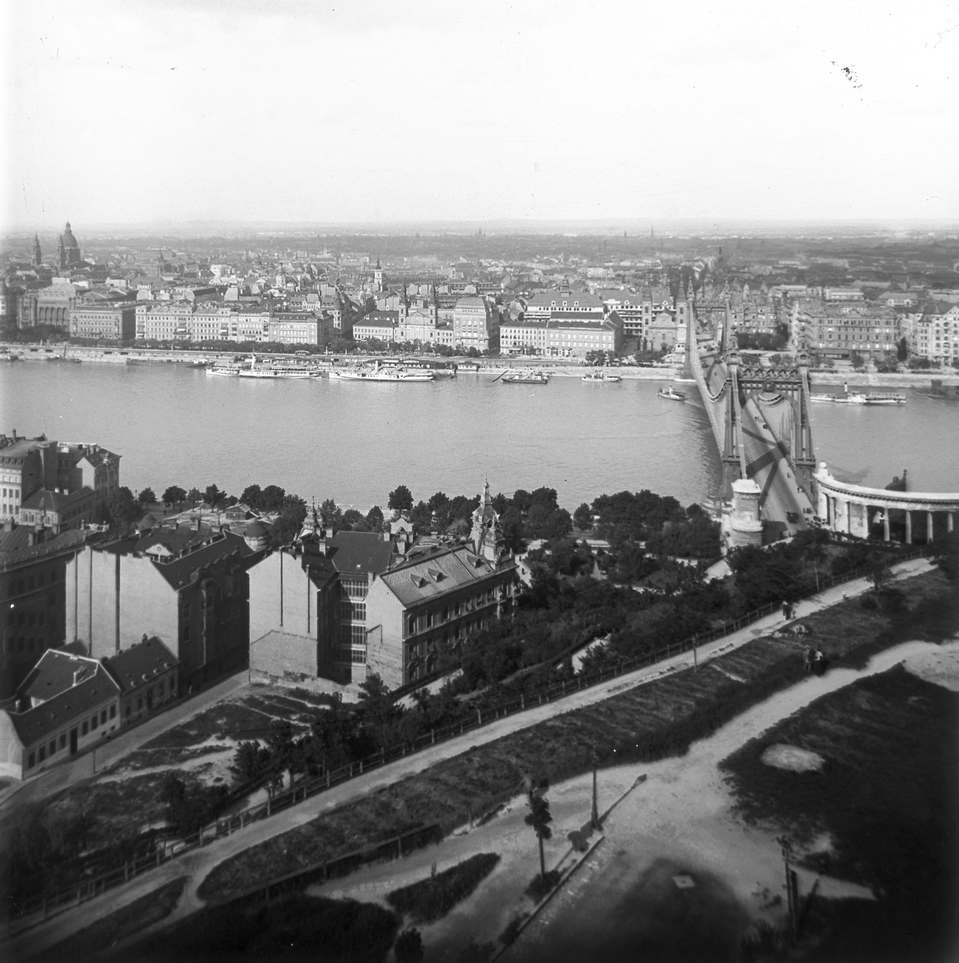 Orom utca 4., kilátás a Hegedűs villából az Erzsébet híd felé. Location: Hungary, Budapest I. Tags: Budapest Title: Orom utca 4., kilátás a Hegedűs villából az Erzsébet híd felé.